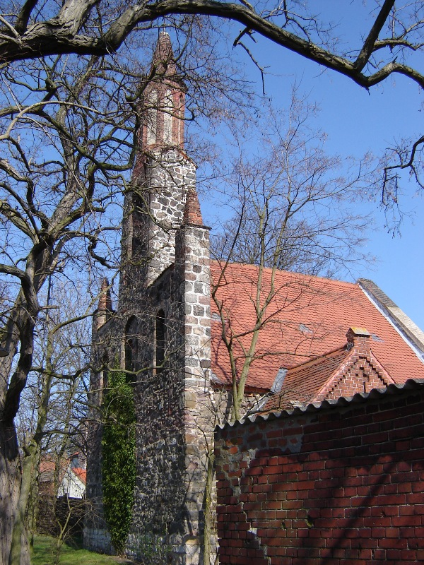 Kirche Hohenwarthe, Sachsen-Anhalt, Westansicht